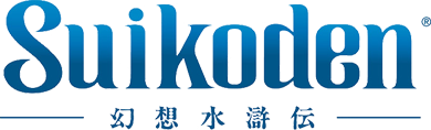 Logo der Videospielreihe Suikoden